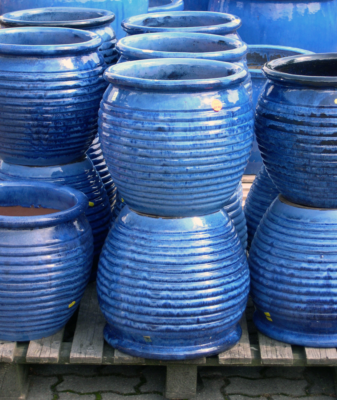 Description: Blue ceramic planters Beschreibung: Blaue Keramikübertöpfe Source: selbst fotografiert, August 2004 Photographer: Alice Wiegand, (Lyzzy)